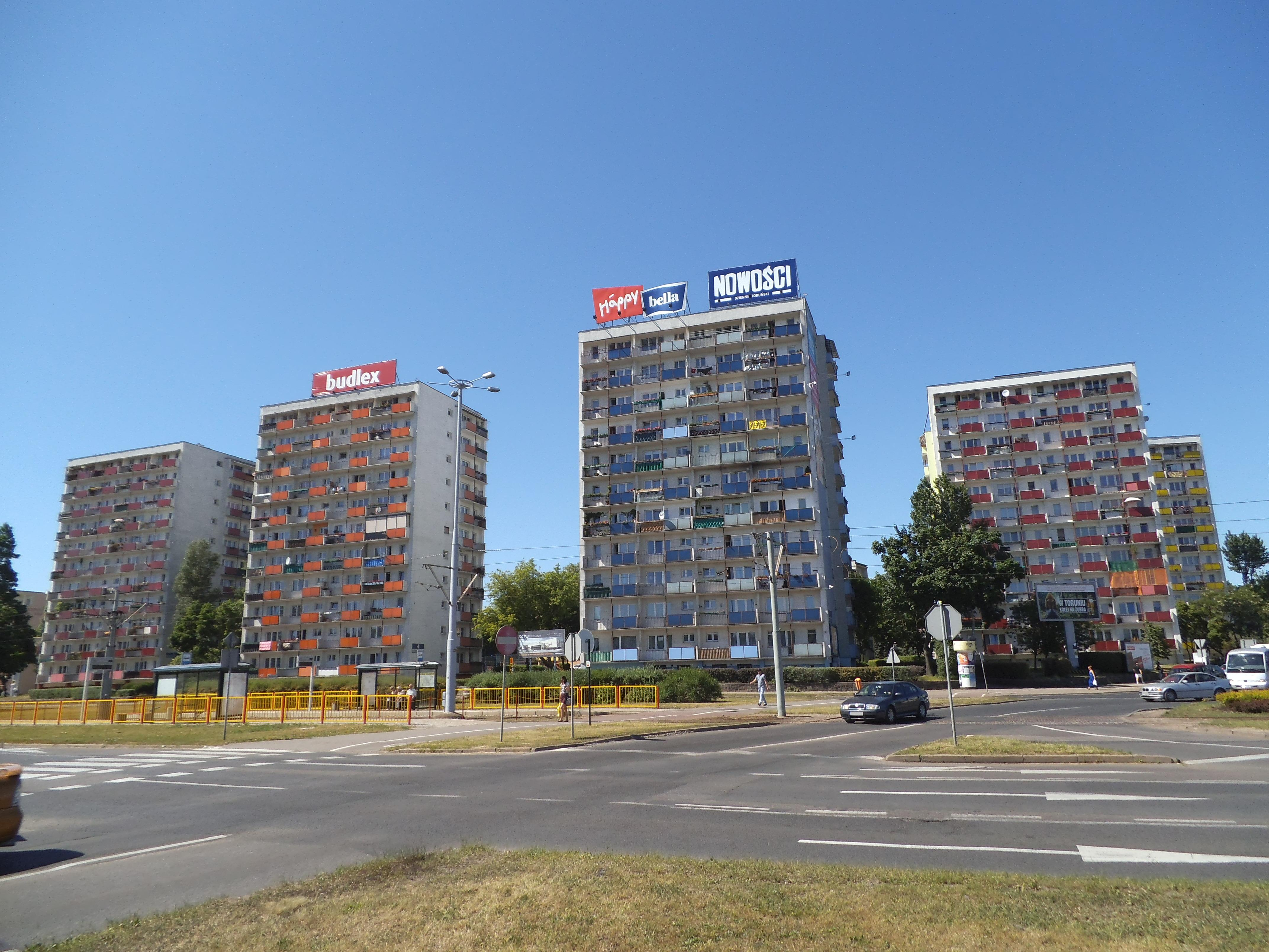 Osiedle Młodych w Toruniu